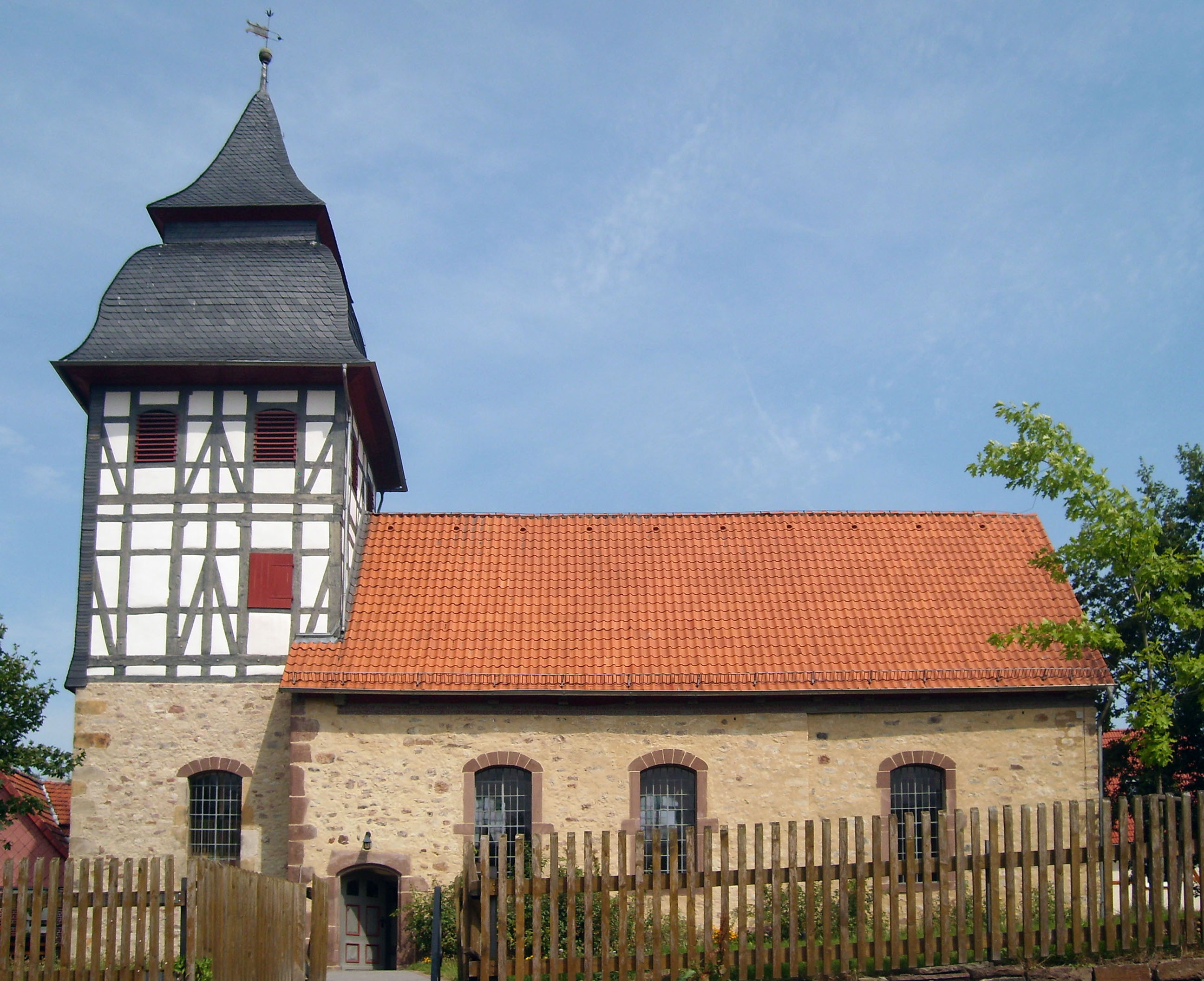 Vernawahlshausen. St. Margarethen-Kirche. Eine offene Kirche. Fürwahr. Besser isses. :o)